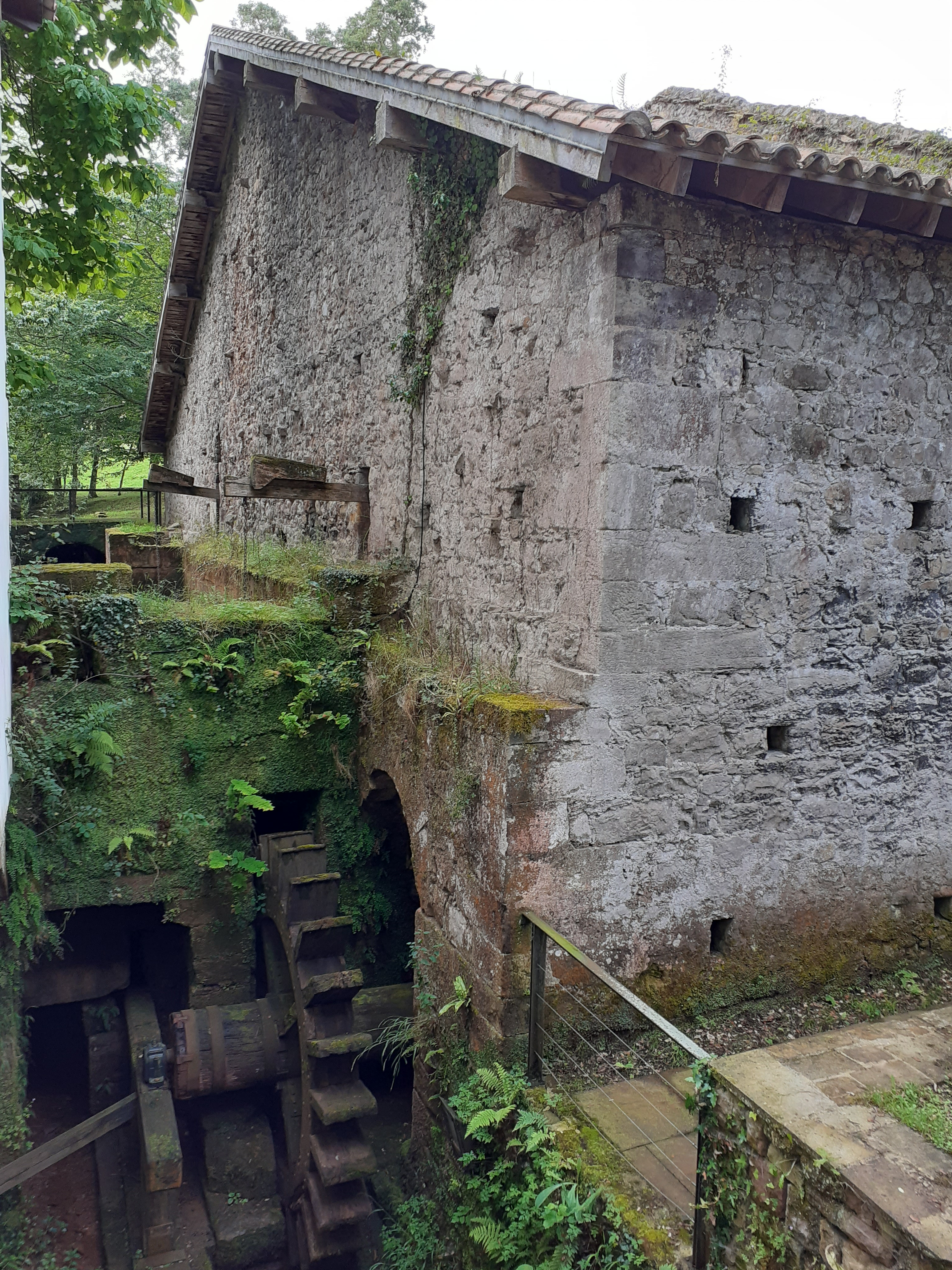 Cadesko burdinola (Herrerias, Kantabria)